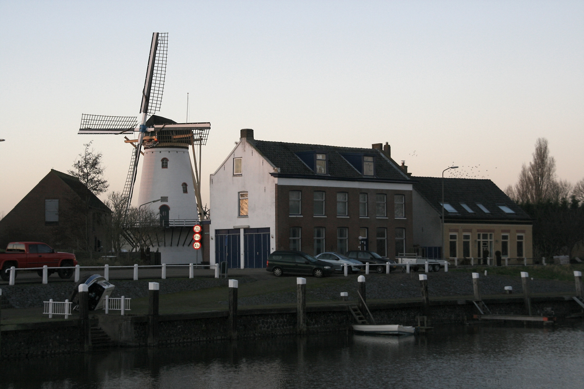 Stellendam, molen Korenlust, vanaf de overzijde van het water gefotografeerd